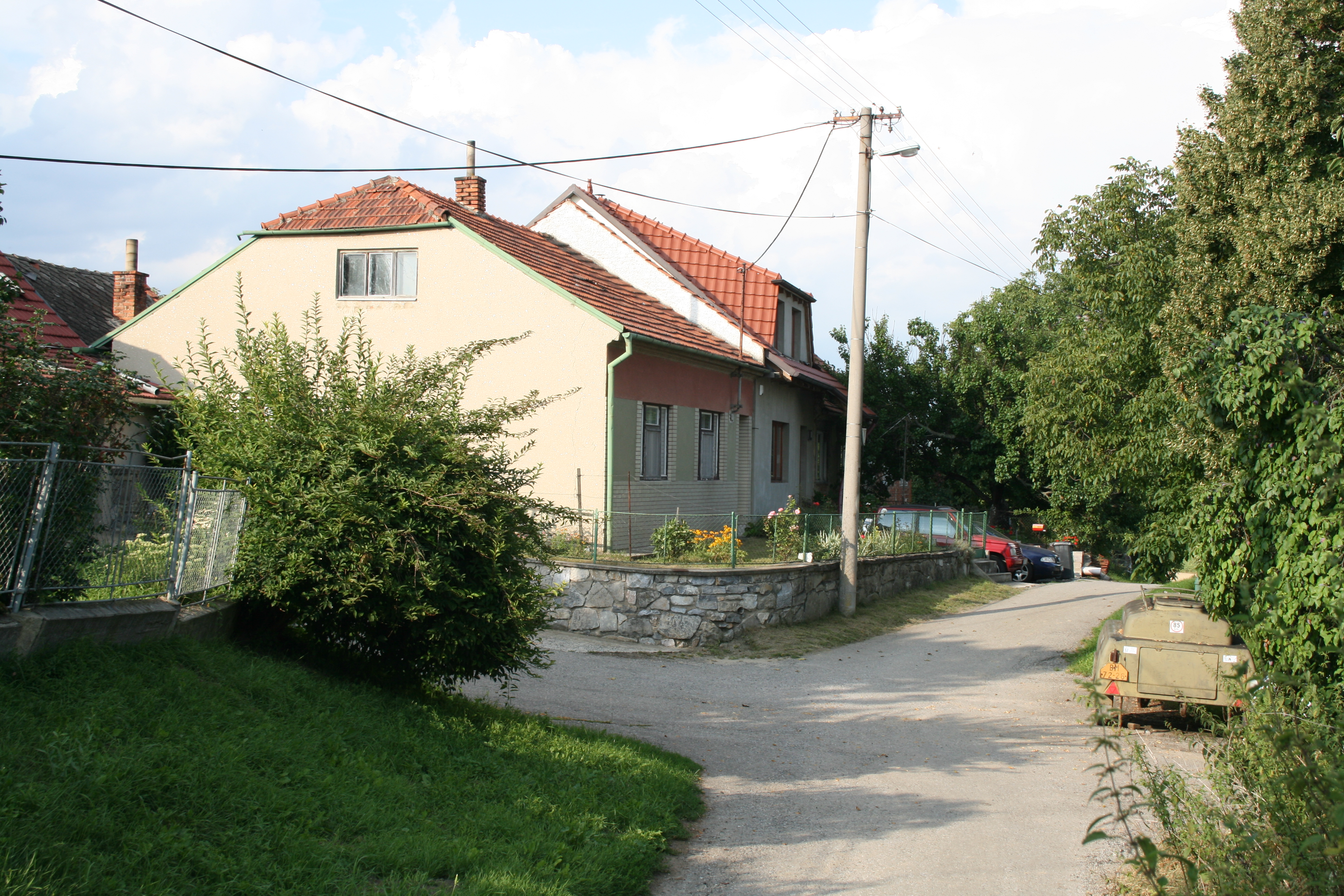 Bývalý zájezdní hostinec Kandie, Malečkova ulice číslo 12, Brno-Líšeň. Pohled od jihozápadu.